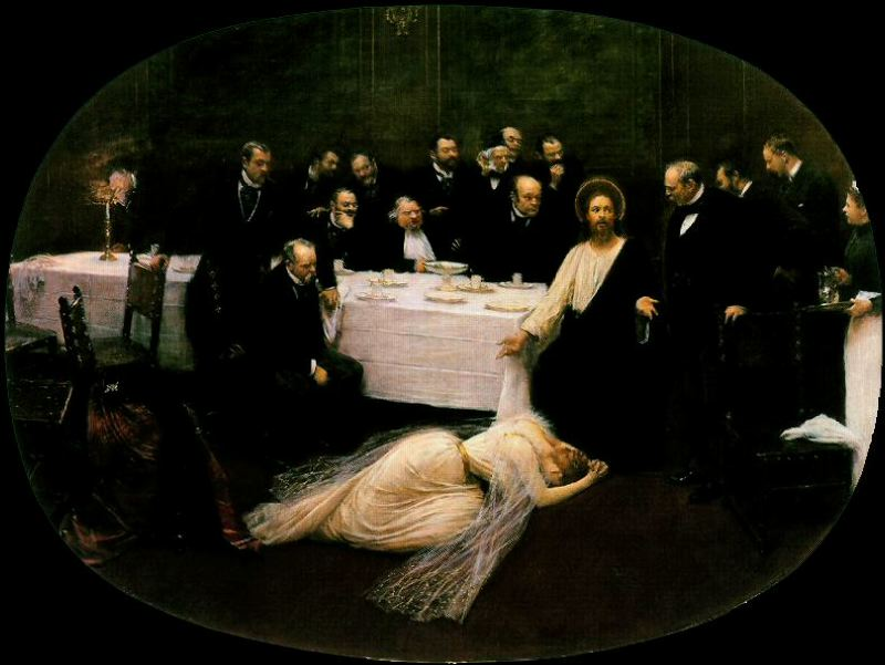 Christ ; Duc-Quercy Antoine (1856-1934) ; Sainte Marie-Madeleine ; Pougy Liane de, née Anne-Marie Chassaigne, épouse d'Henri Pourpre puis du prince Georges Ghika (1869-1950) ; Simon le Pharisien ; Renan Ernest (1823-1892) ; Taine Hippolyte (1828-1893) ; Weiss Jean-Jacques (1827-1891) ; Lemoinne John (1815-1892) ; Taigny Edmond ; Chevreul Eugène (1786-1889) ; Dumas Alexandre fils (1824-1895) ; Proust Adrien Dr (1834-1903) ; Béraud Jean (1848-1935)